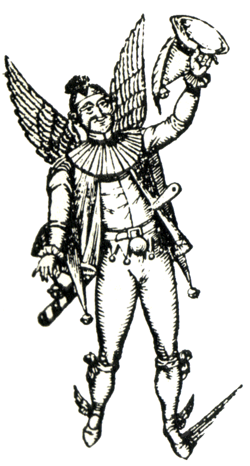 Darstellung eines Kölner Hanswurst aus dem Jahre 1831